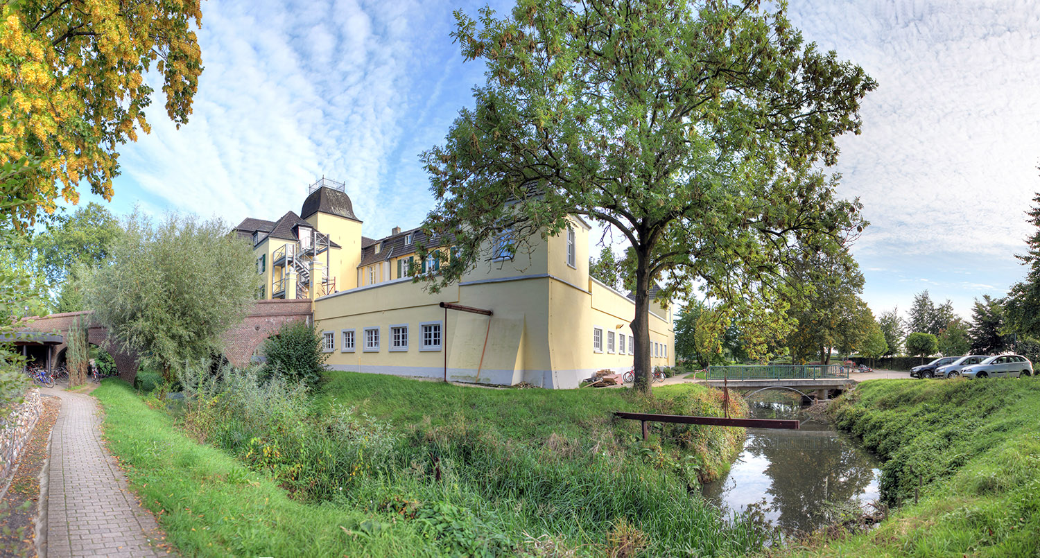 Wasserschloss Bellinghoven, Rees-Haffen